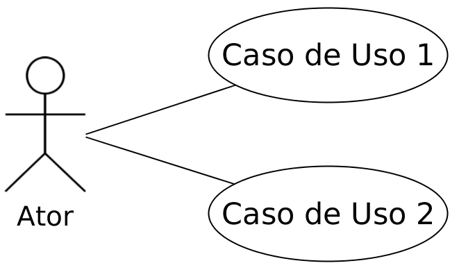 Exemplo de um mini-diagrama UML